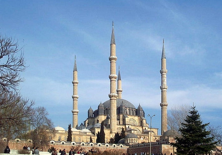 Edirne Turkey